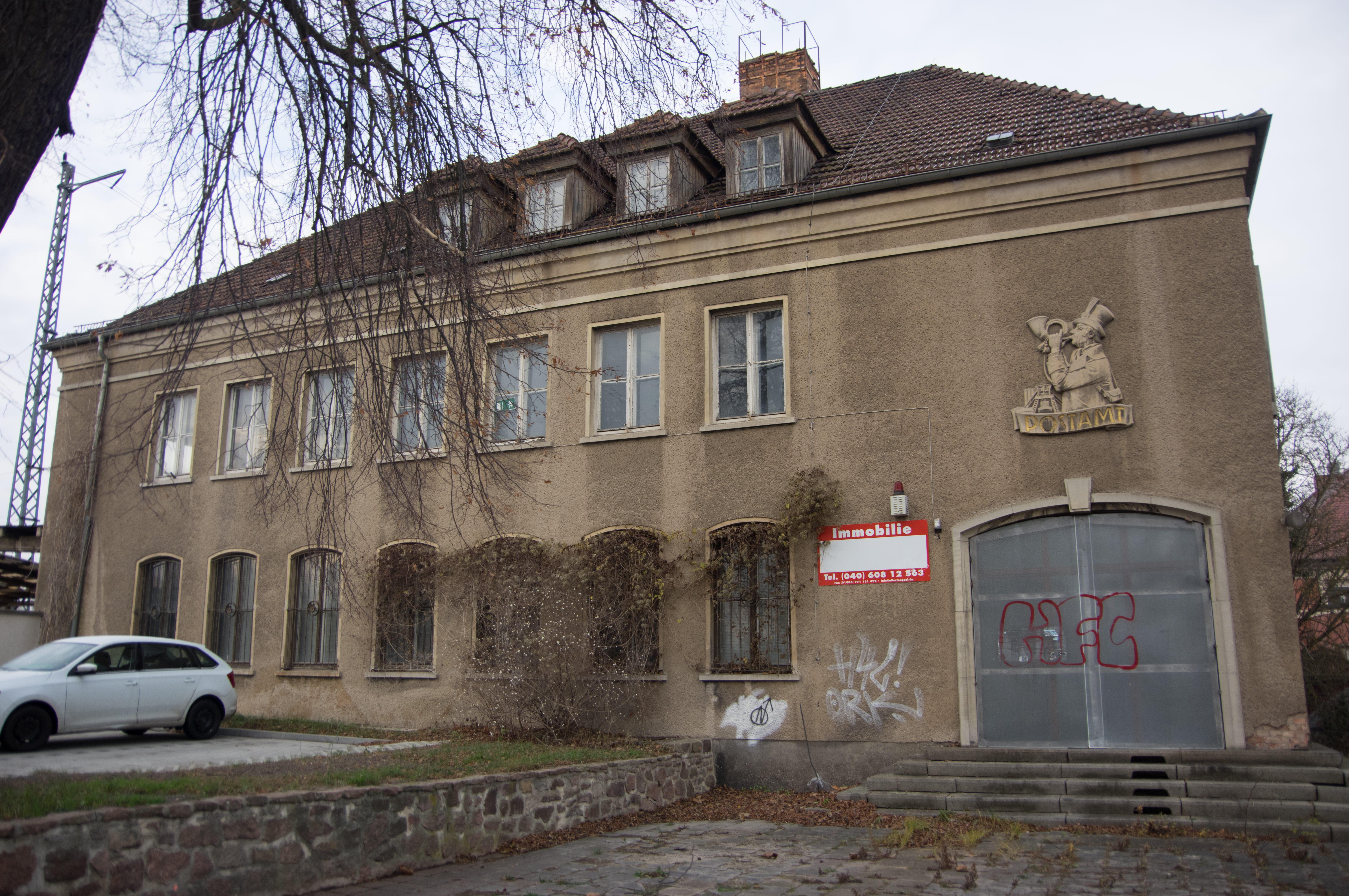 Lutherstadt Eisleben in Sachsen-Anhalt. Das Postamt wurde in den 1950er Jahren erbaut. Es steht unter Denkmalschutz.